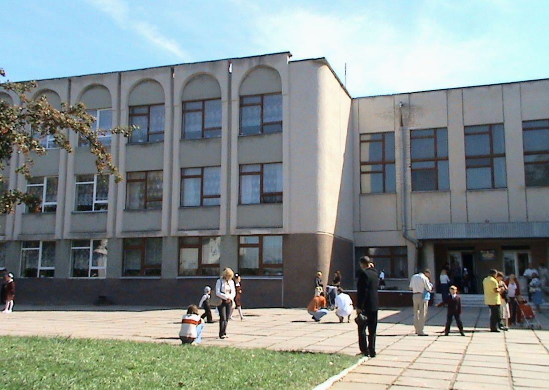 2. Schule in Pustomyty